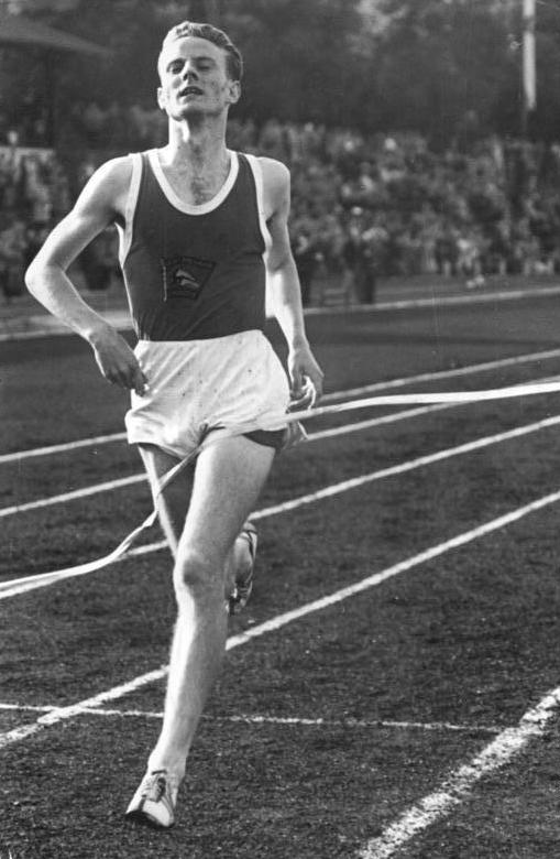 Klaus Richtzenhain Zentralbild Wlocka 22.7.1956 VII. DDR-Leichtathletik-Meisterschaften in Erfurt In der Zeit vom 20. bis zum 22. Juli 1956 werden in Erfurt die VII. Leichtathletik-Meisterschaften der DDR ausgetragen. UBz: Der Leipziger Klaus Richtzenhain kam im 800-m-Lauf der Herren in einer Zeit von 1:50,3 Min. vor dem Titelverteidiger Heli Reinnagel (Dynamo) zu Meisterehren. Richtzenhain passiert als klarer Sieger das Ziel.